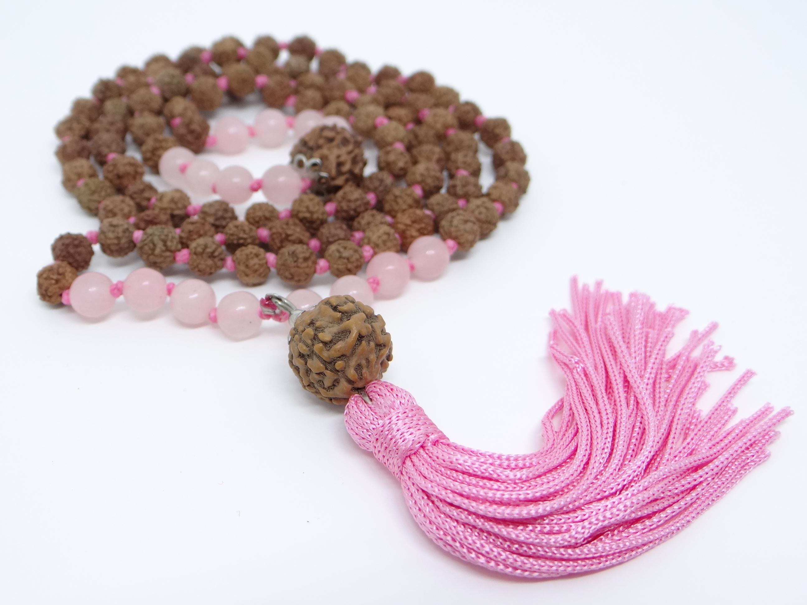 Este é um japamala hindu confeccionado com 108 contas. Sementes de rudraksha e quartzo rosa são amarrada entre nós que evitam que as contas se desprendam nas práticas meditativas.